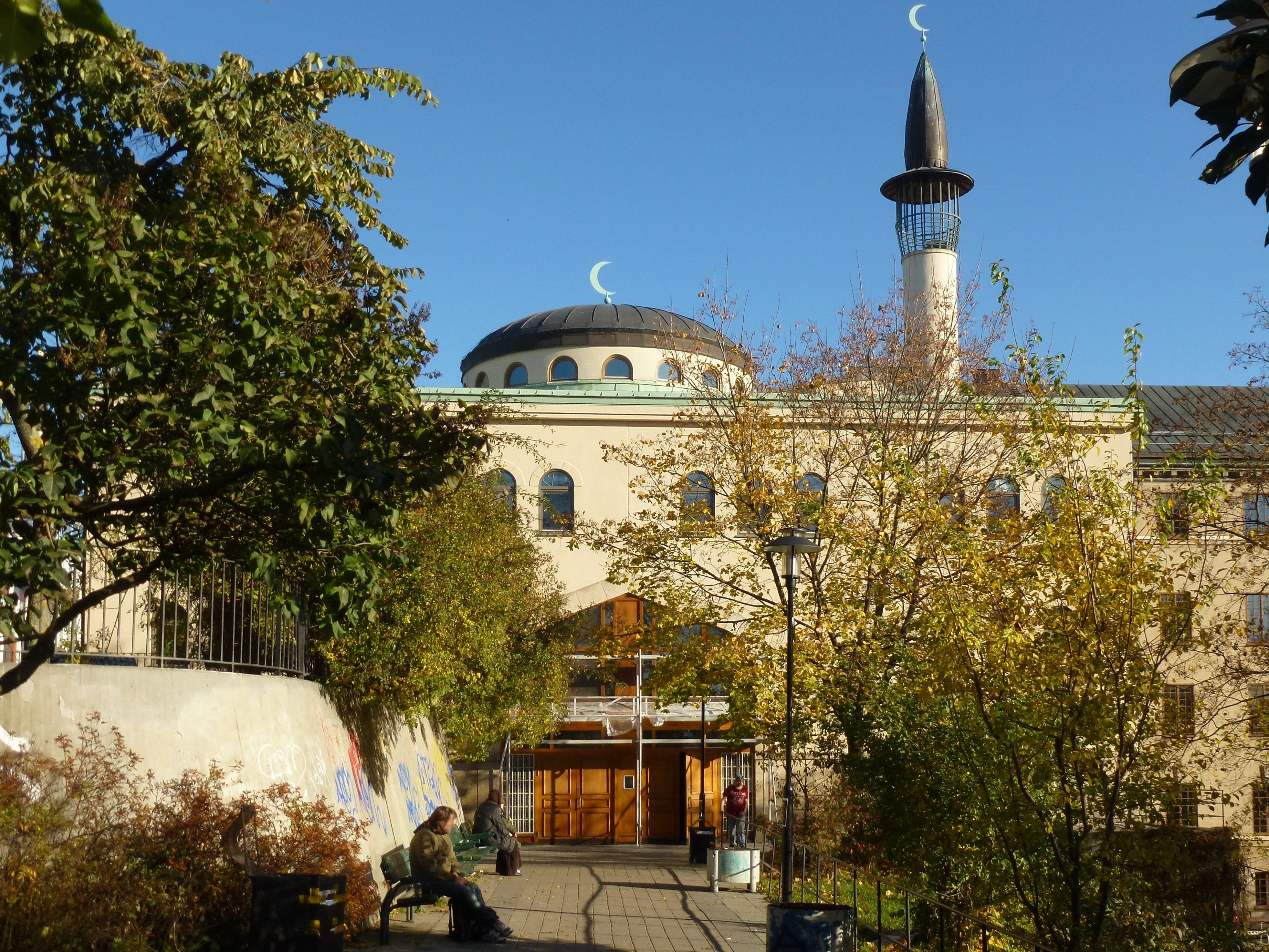 Stockholms moské